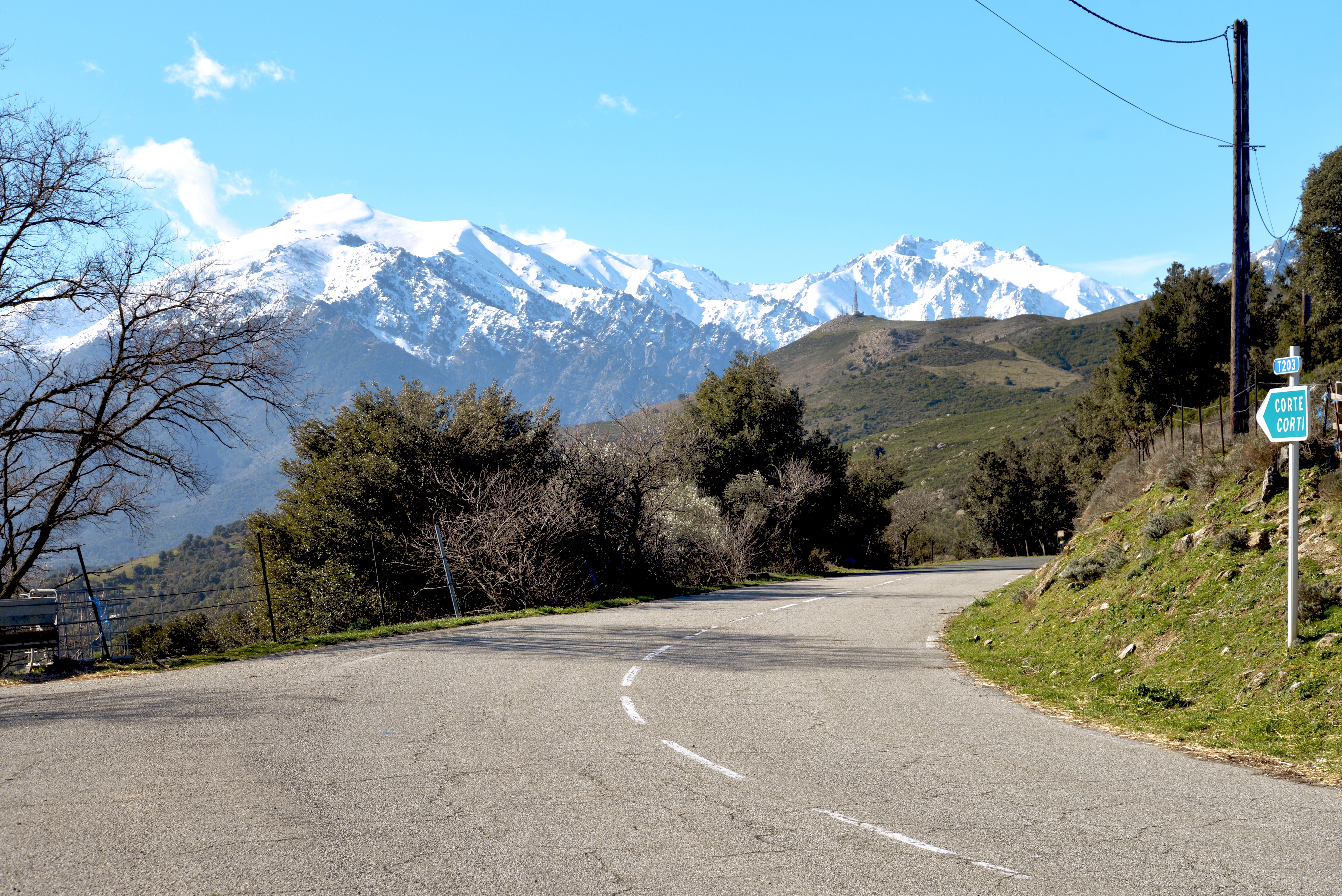 Tralonca, Talcini (Haute-Corse) - Col de San Quilico où passait la RN 193, voie remplacée aujourd'hui par la route T203. À l'arrière-plan, le Monte Cardo et le Monte Rotondo, deux des plus hauts sommets de l'île.